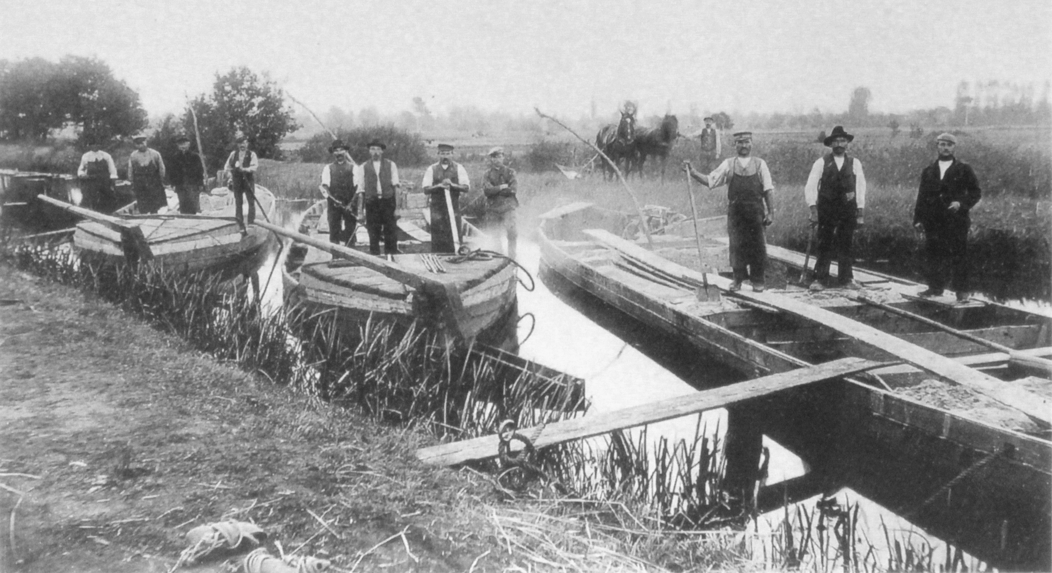 Kähne auf dem Elsterwerda-Grödel-Floßkanal an der Lehmgrube bei Wülknitz